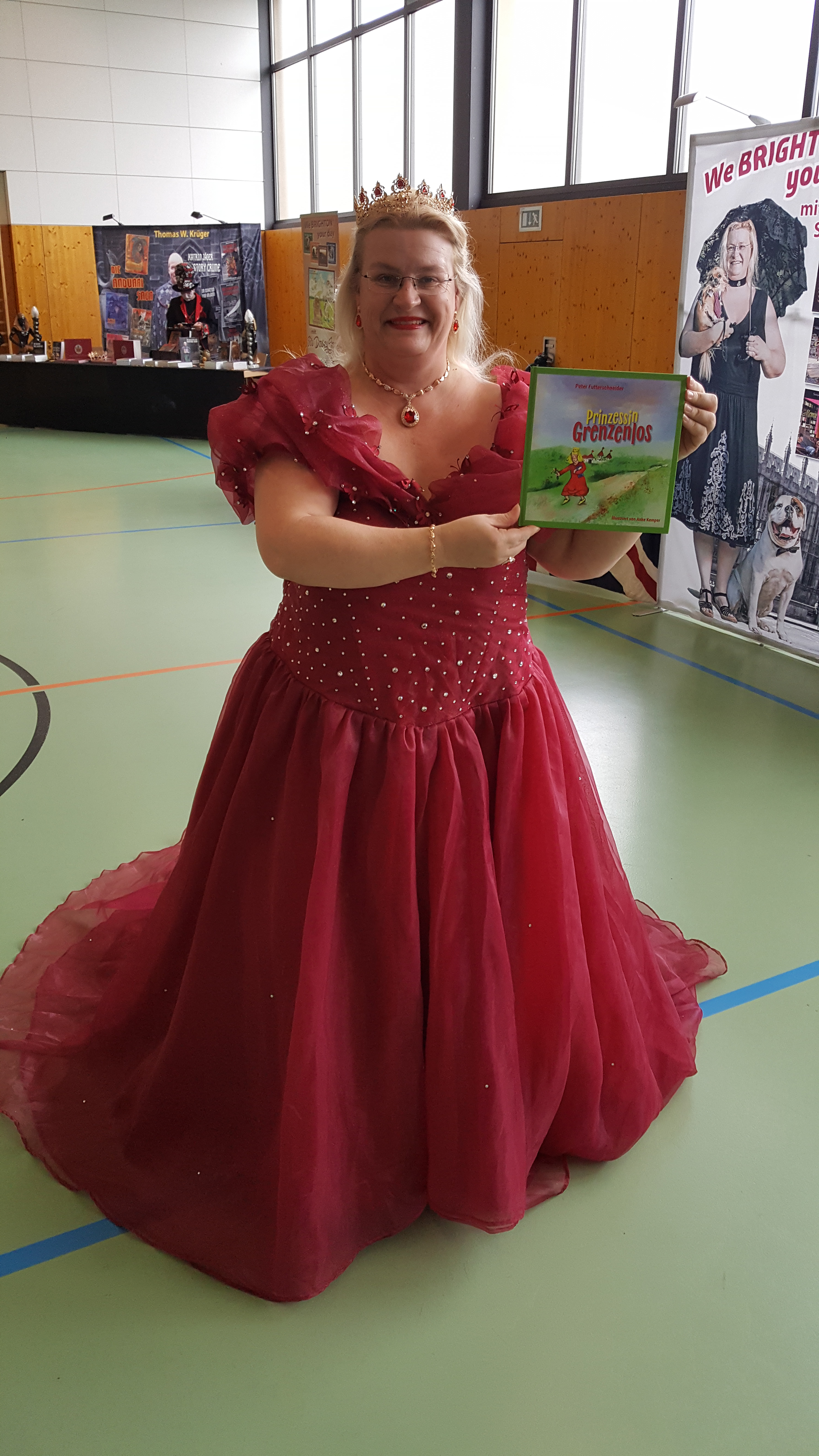 Brighton Verlag, Prinzessin Grenzenlos